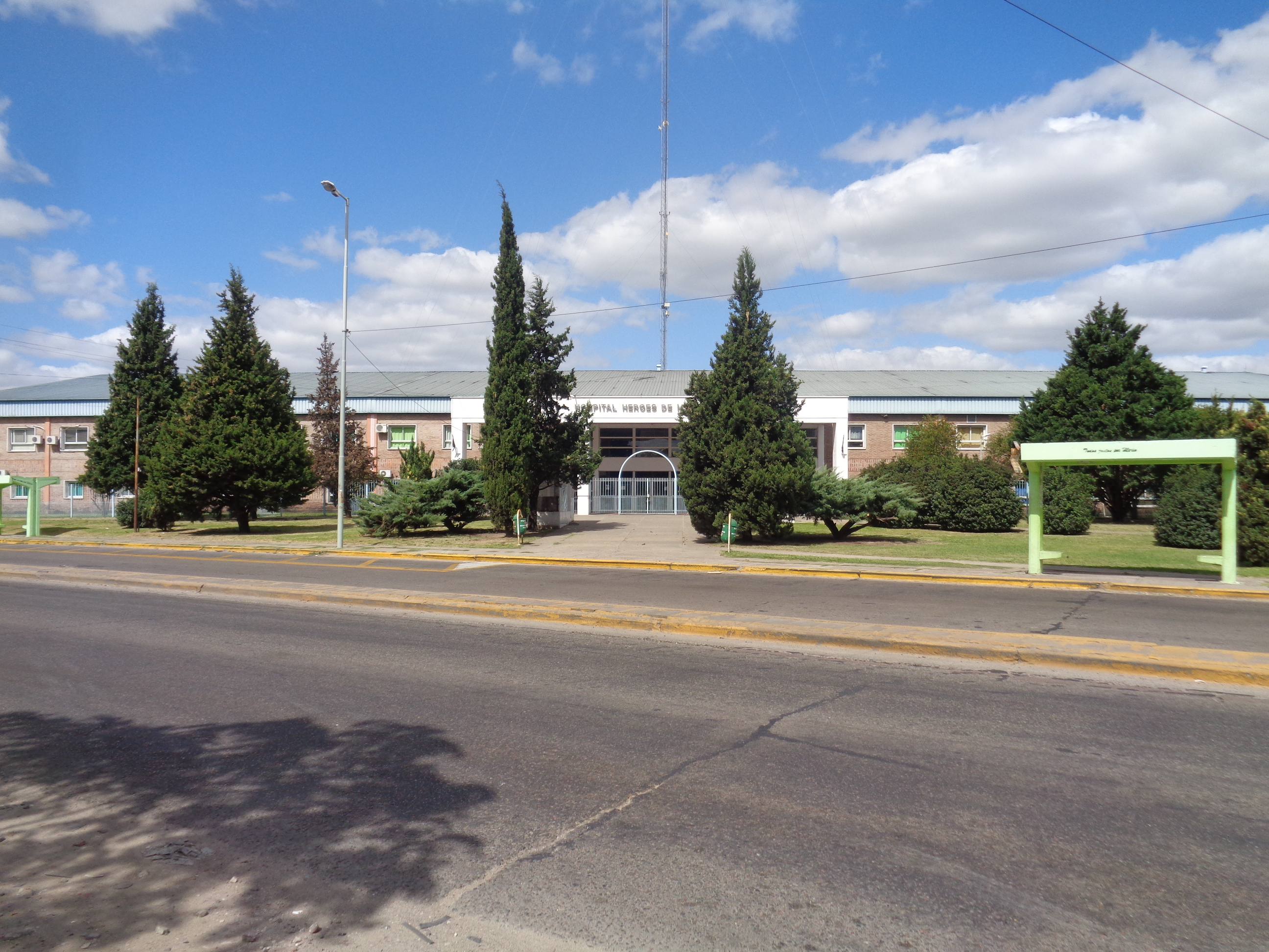 Hospital Zonal que es administrado por la Provincia de Buenos Aires. Inaugurado en los ´90.